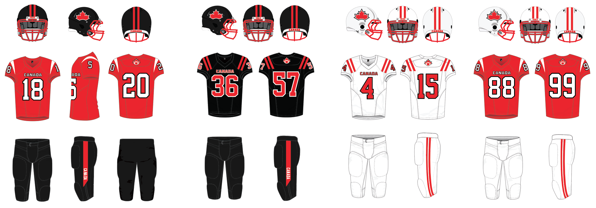 Uniformes de l'équipe nationale de Football Canada depuis 2016